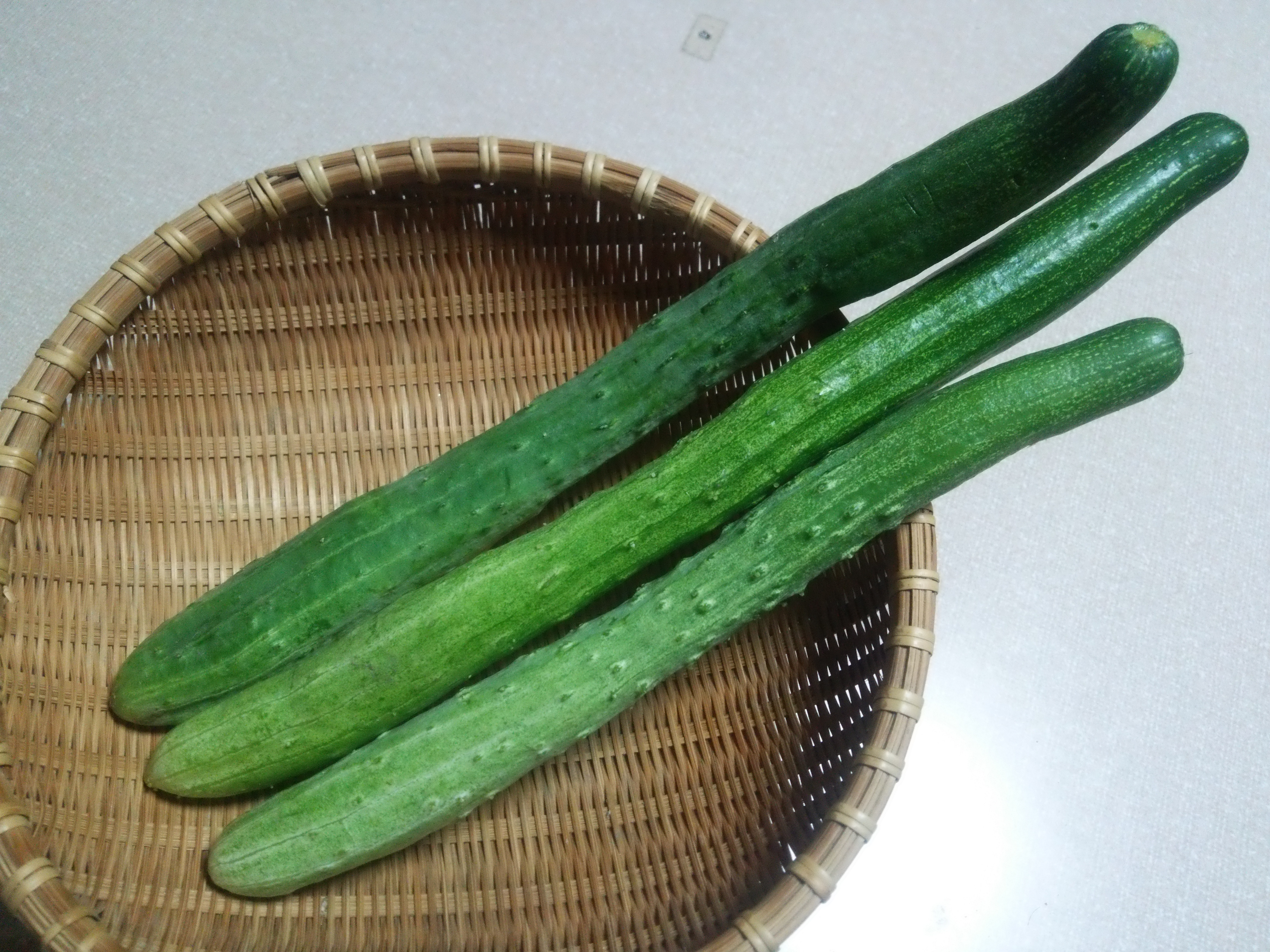 大和伝統野菜「大和三尺きゅうり」